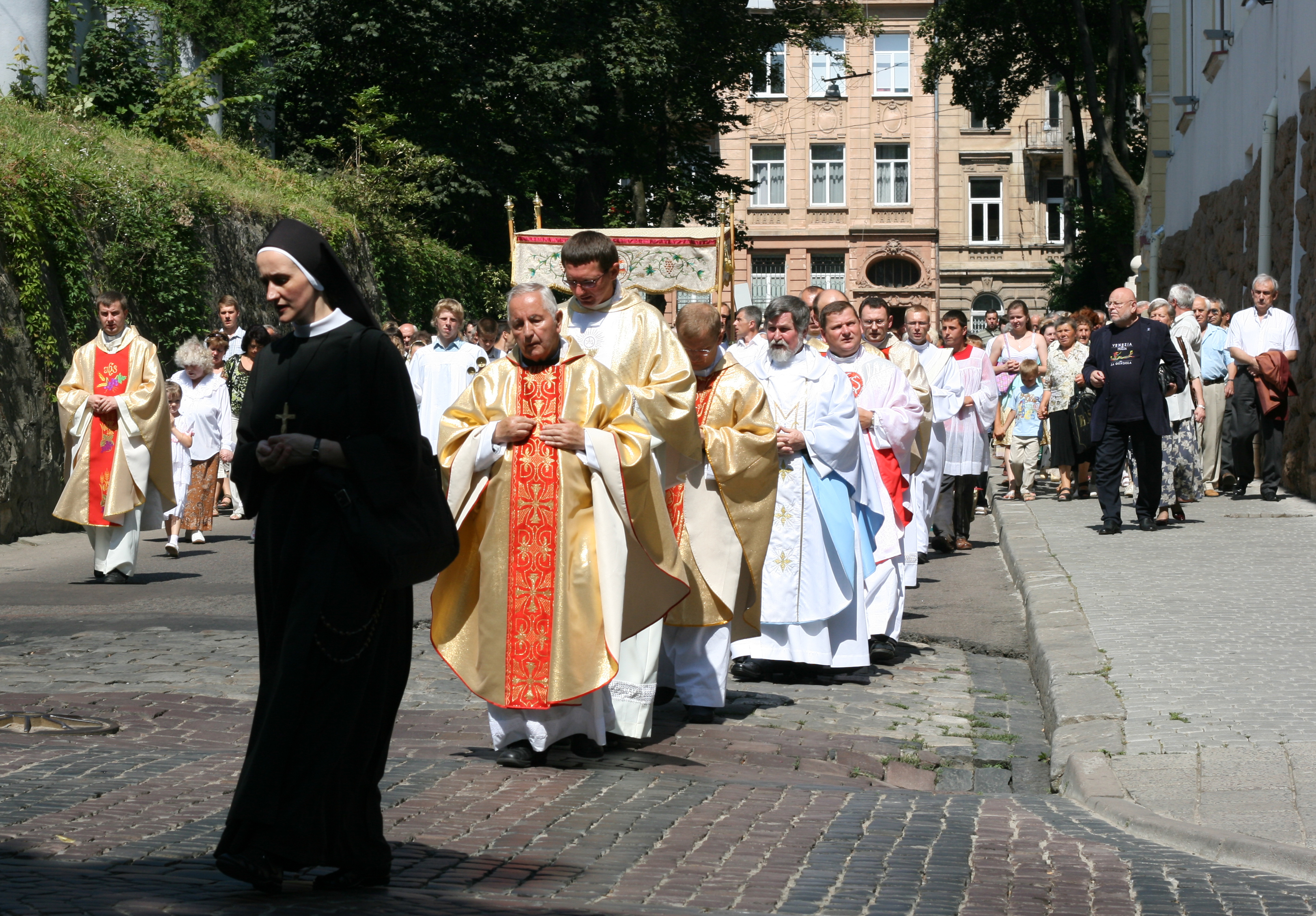 Крёстный ход у римокатоликов во Львове